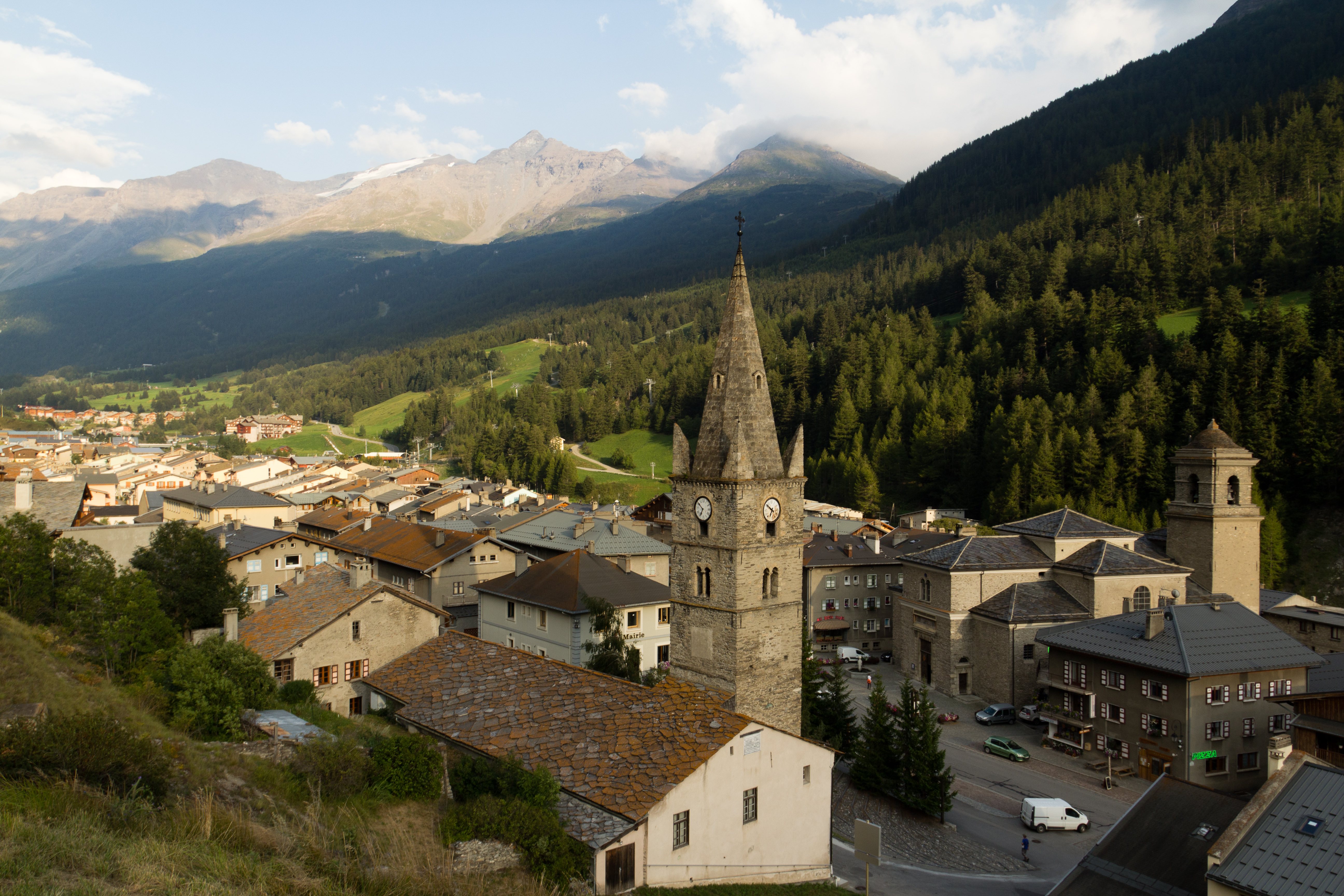 L'ancienne église se trouve au premier plan. La nouvelle église, Notre-Dame de l'Assomption, se trouve sur la droite de l'image.